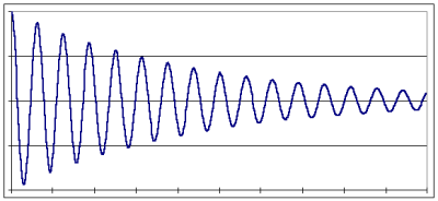 Eigen werk